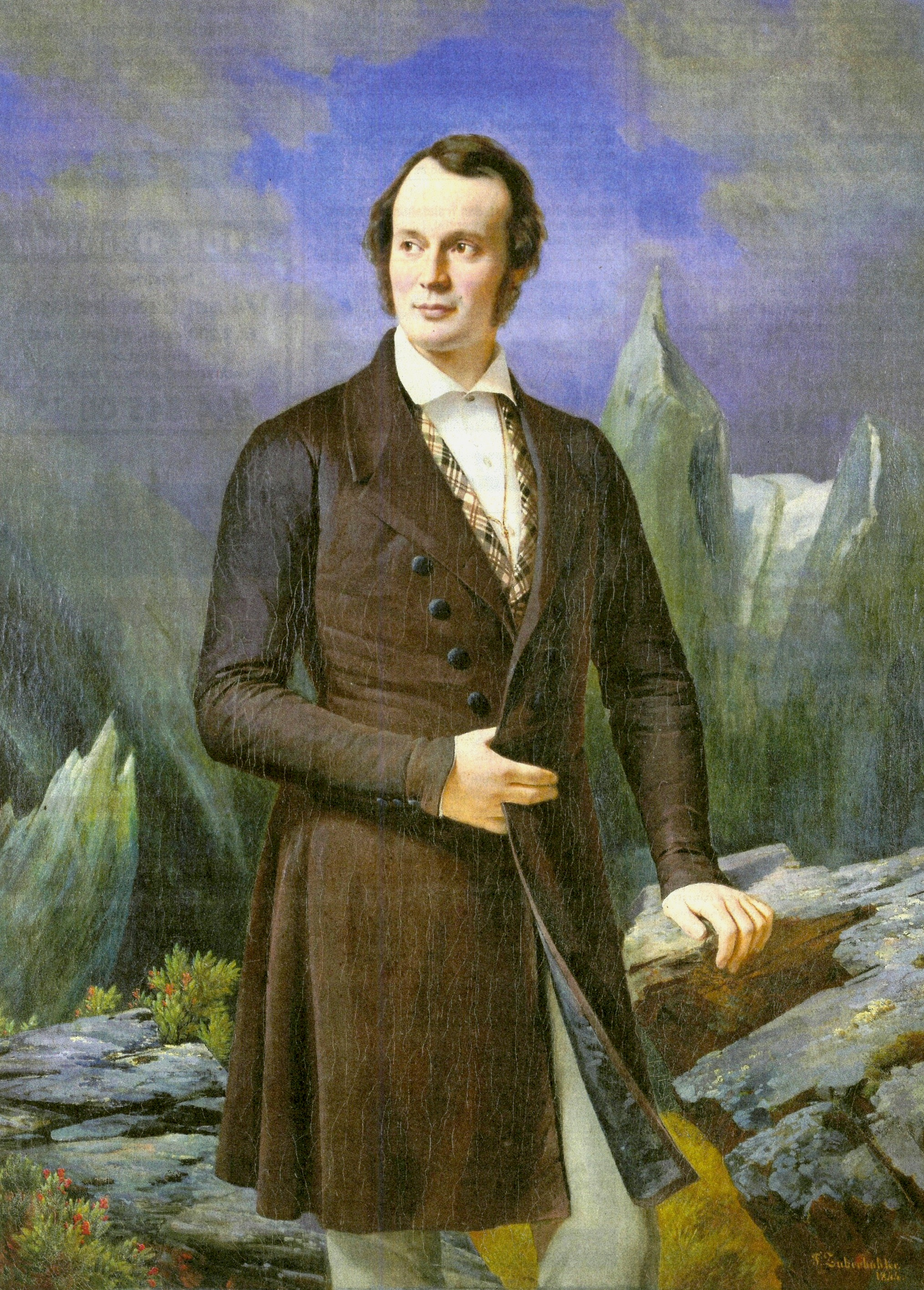 Louis Agassiz 1840, Gemälde von Fritz Zuberbühler